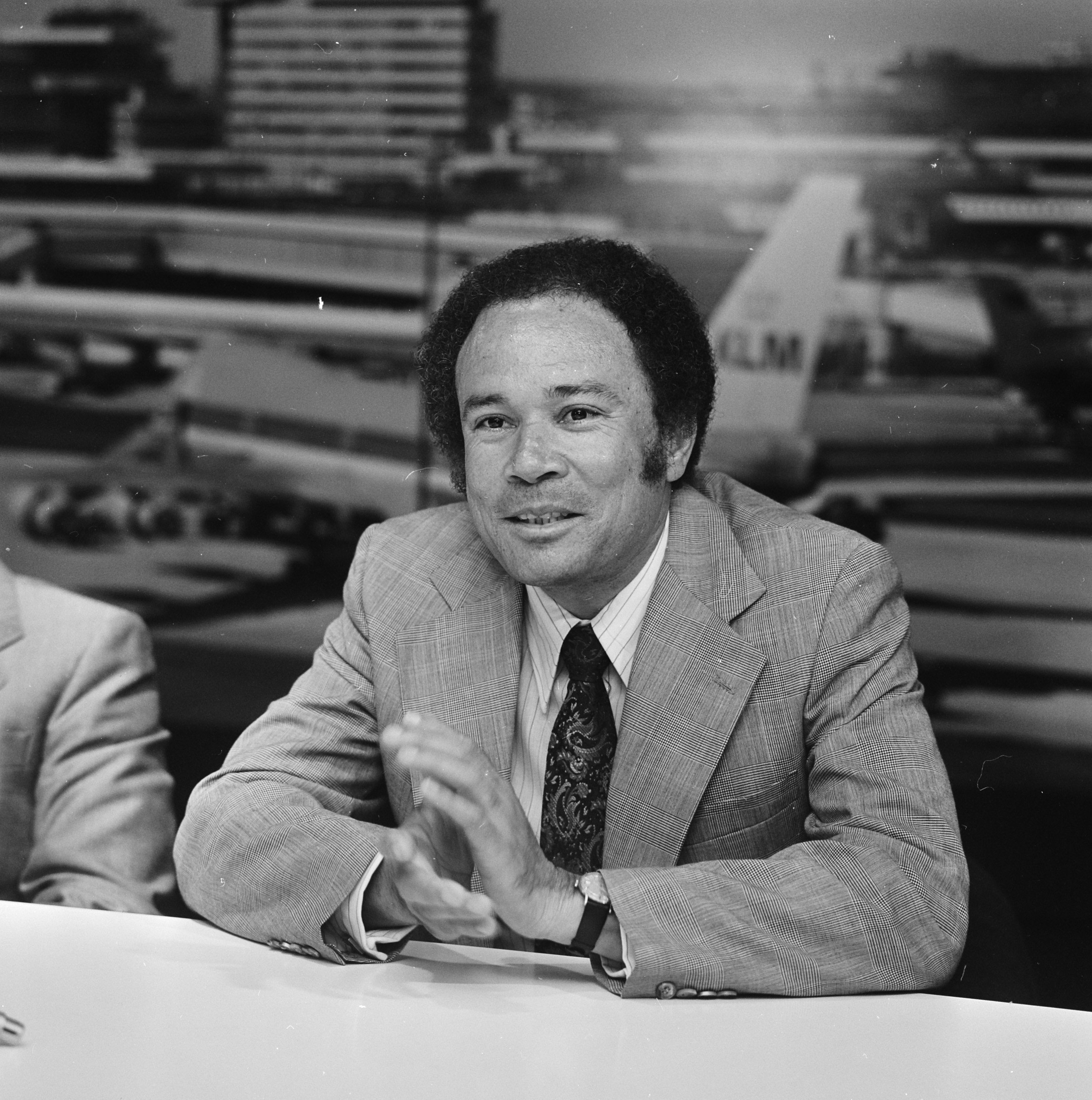 Collectie / Archief : Fotocollectie Anefo Reportage / Serie : [ onbekend ] Beschrijving : Aankomst Antilliaanse minister van welvaartszorg Miguel Pourier tijdens persconferentie Datum : 24 oktober 1978 Locatie : Schiphol Trefwoorden : aankomst en vertrek, ministers, persconferenties, portretten Persoonsnaam : Pourier, M.A. Fotograaf : Croes, Rob C. / Anefo Auteursrechthebbende : Nationaal Archief Materiaalsoort : Negatief (zwart/wit) Nummer archiefinventaris : bekijk toegang 2.24.01.03 Bestanddeelnummer : 929-9614